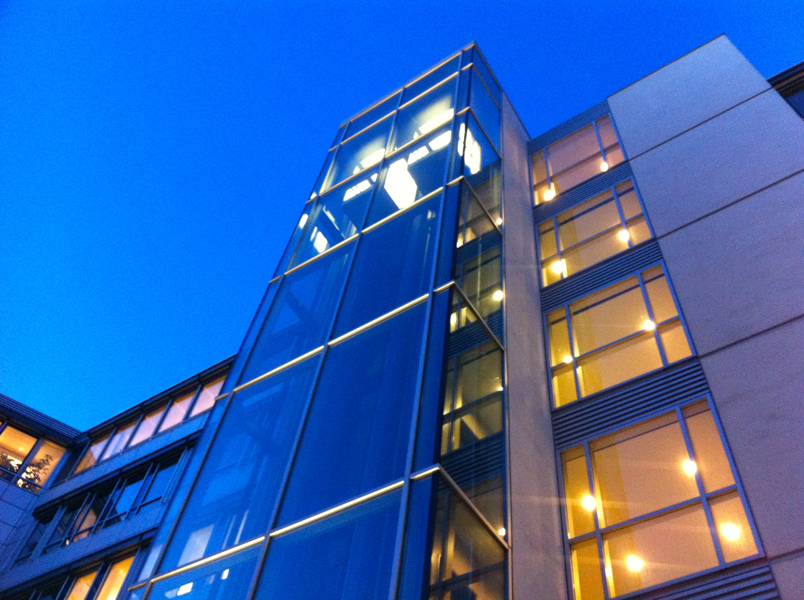 BSH Zentrale